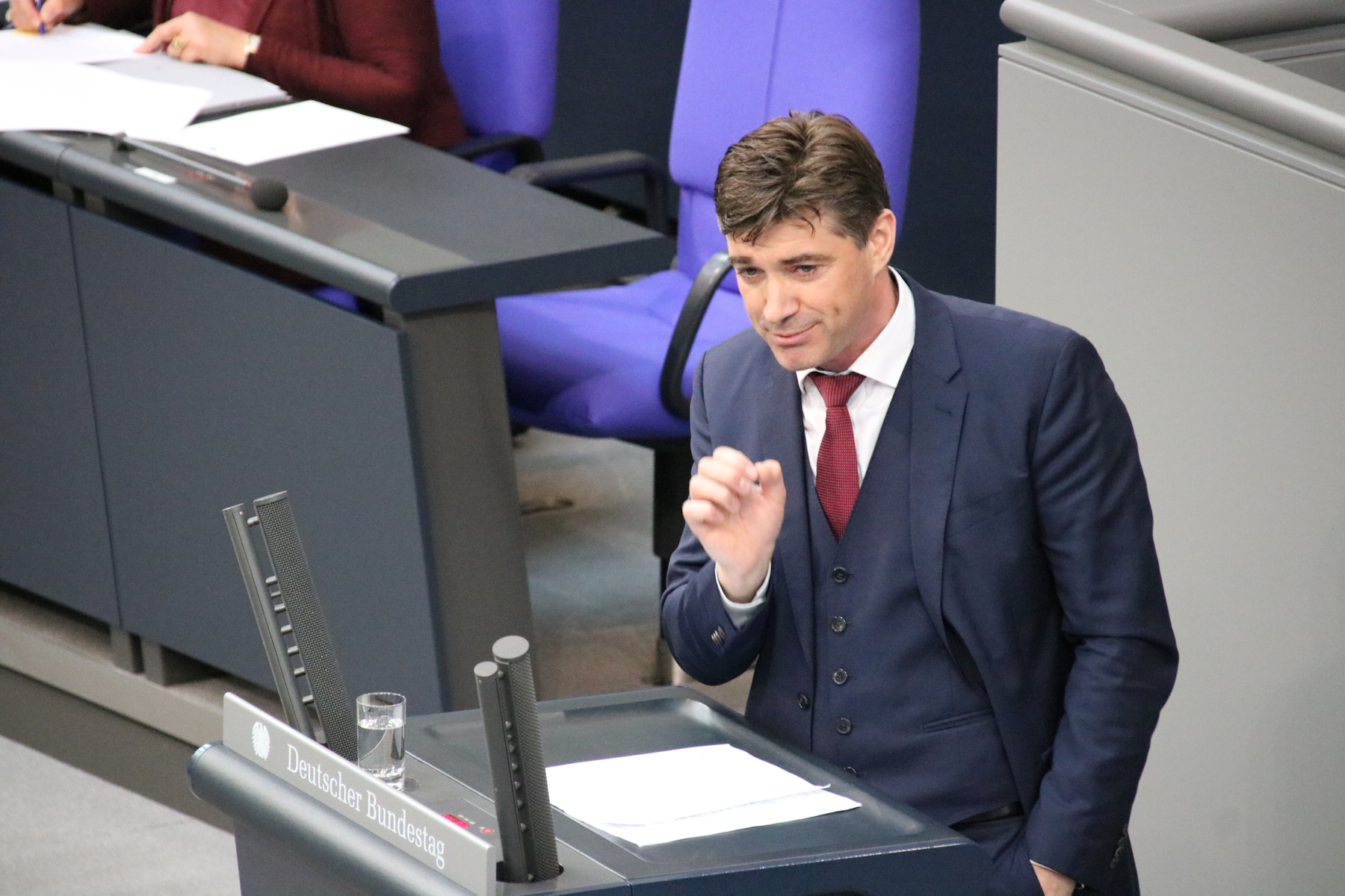 Hagen Reinhold spricht im Plenum des Deutschen Bundestages.